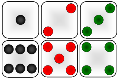 Kismet die faces.